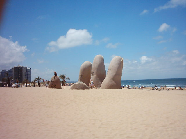 Monumento de los dedos (Punta del Este, Uruguay)